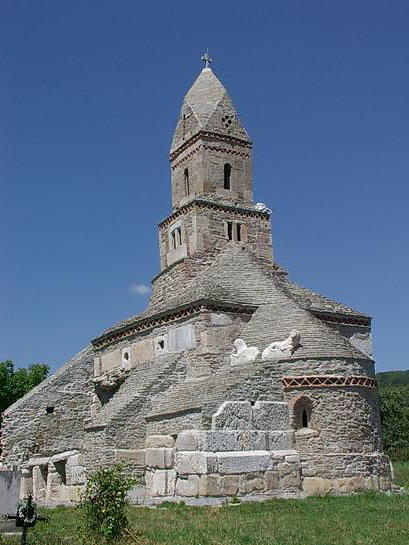 Biserica Sfântul Nicolae - Densus